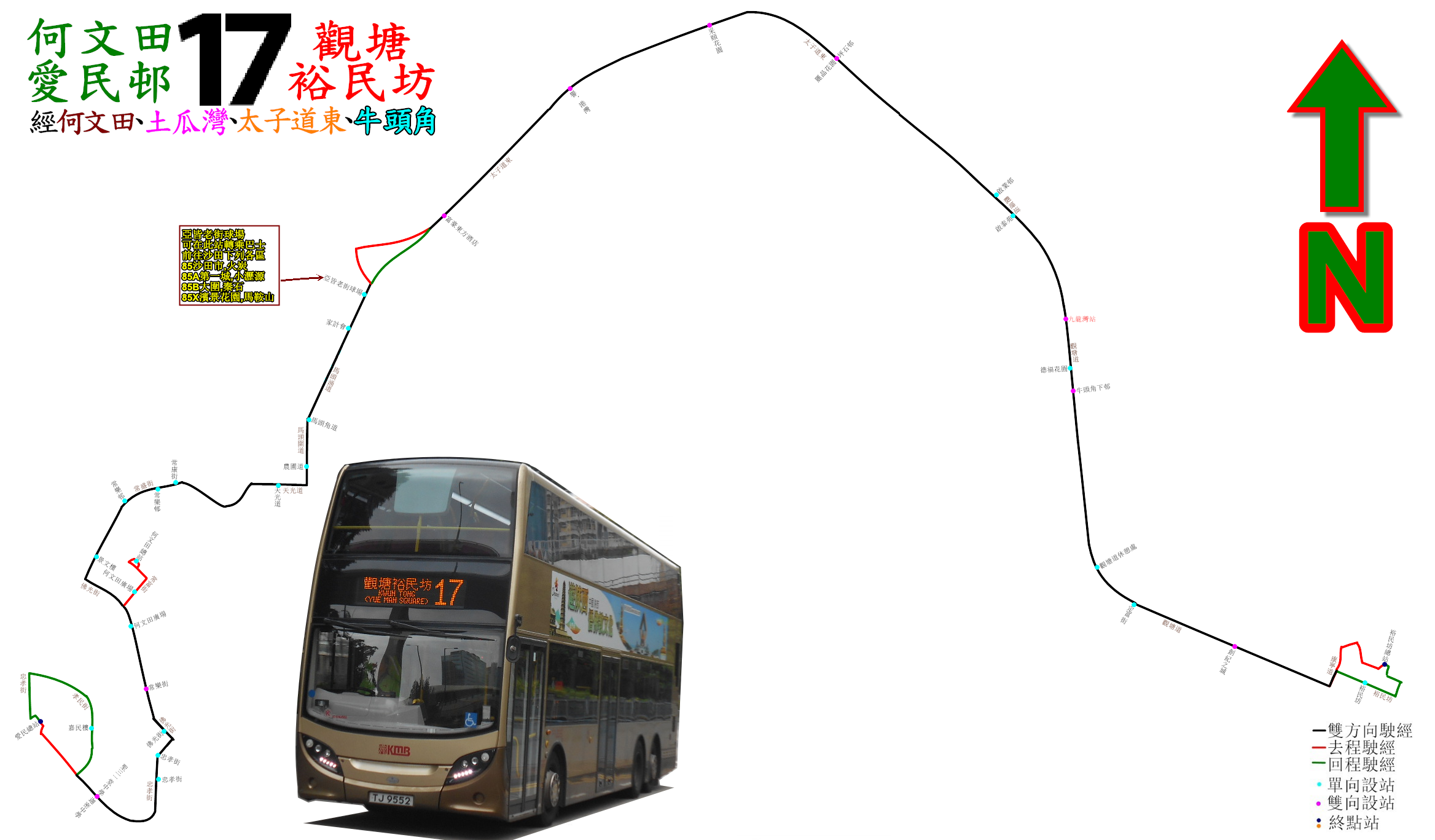 中文（香港）: 九巴17號線的走線圖